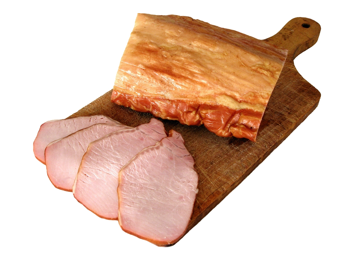 polędwica wieprzowa